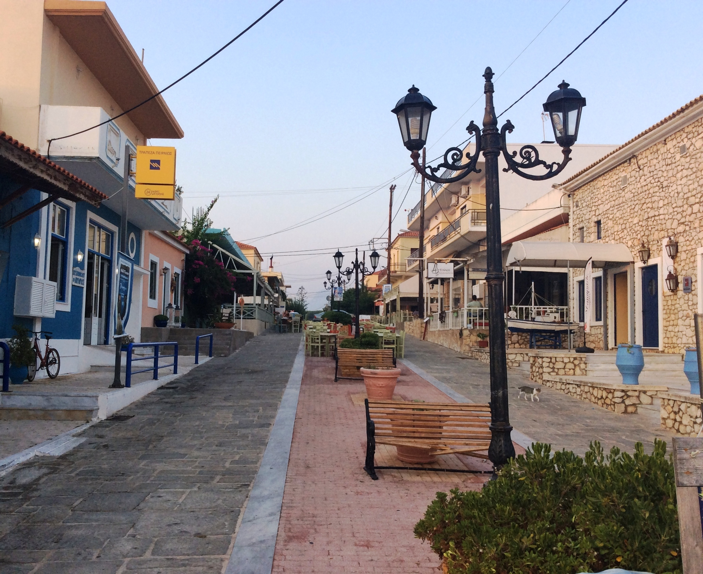 Μαραθόπολη. Προς τον παραλιακό πεζόδρομο του Μαράθου.